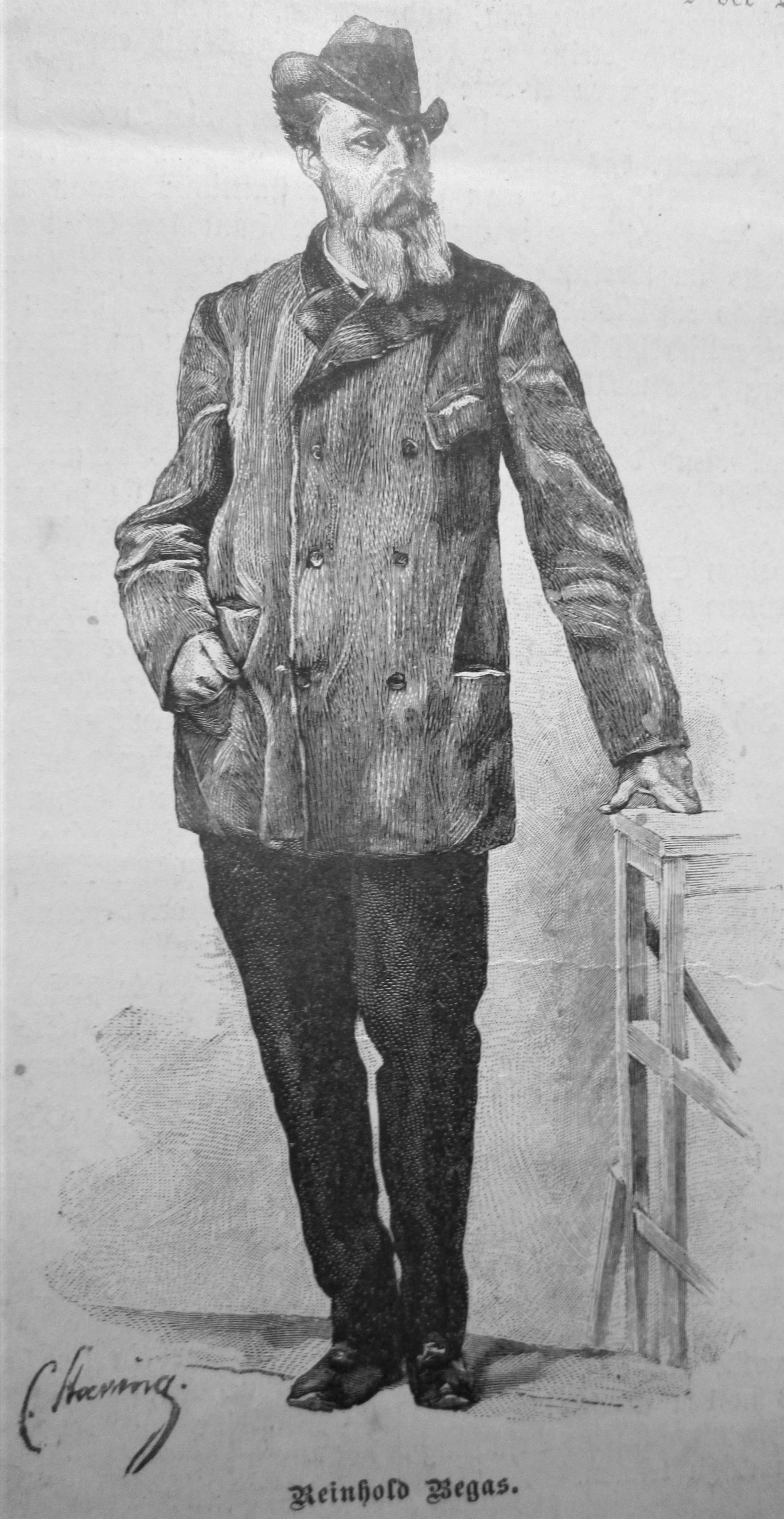 Reinhold Begas, Holzstich aus Gartenlaube 1891